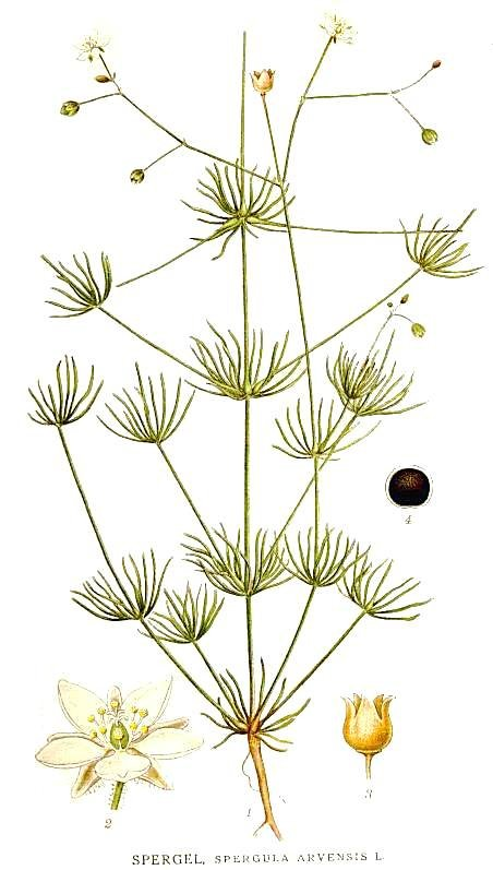 Original Description Spergel, Spergula arvensis L.